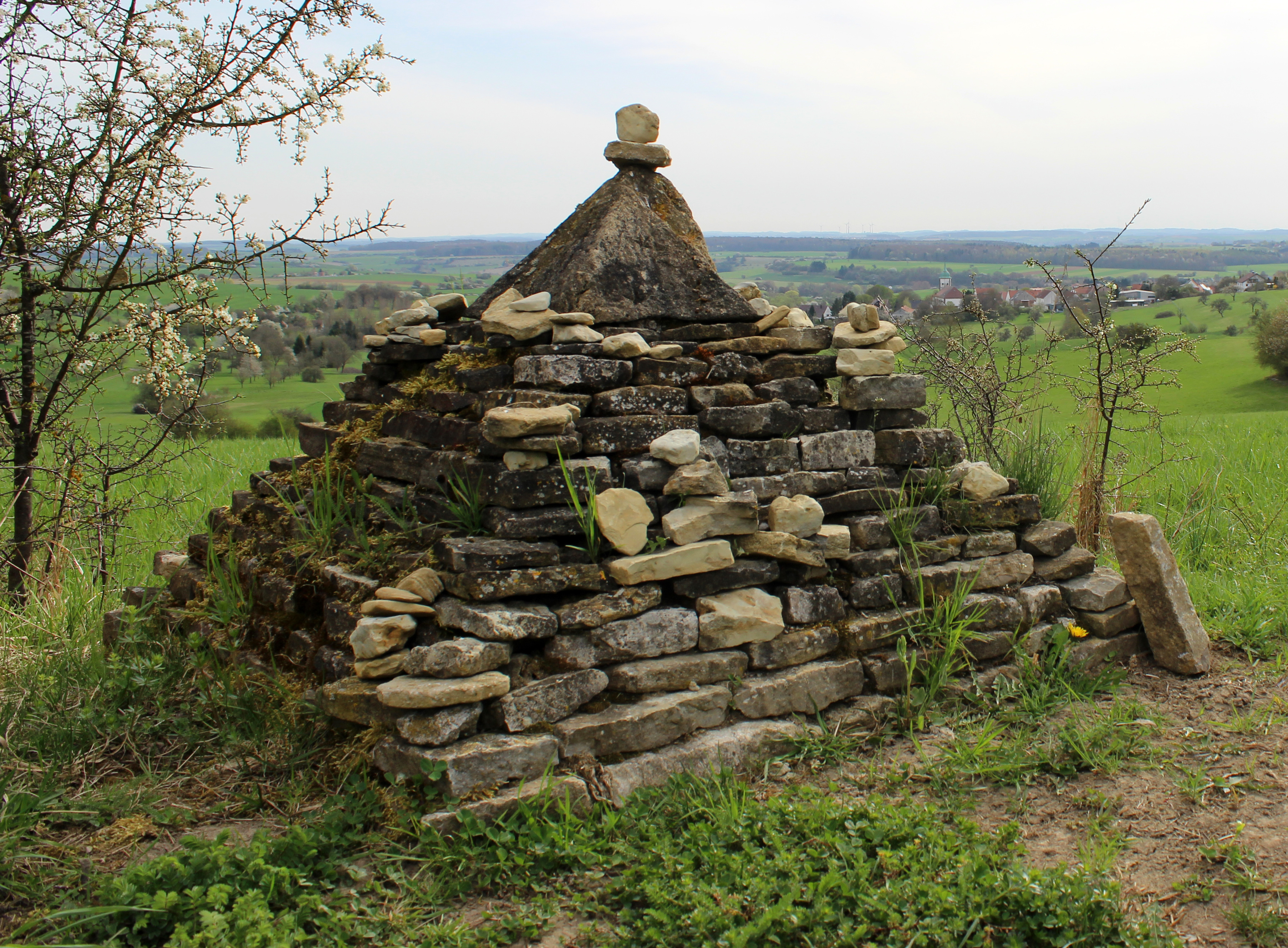 Steinpyramide in der Nähe von Medelsheim, Gemeinde Gersheim, Saarland